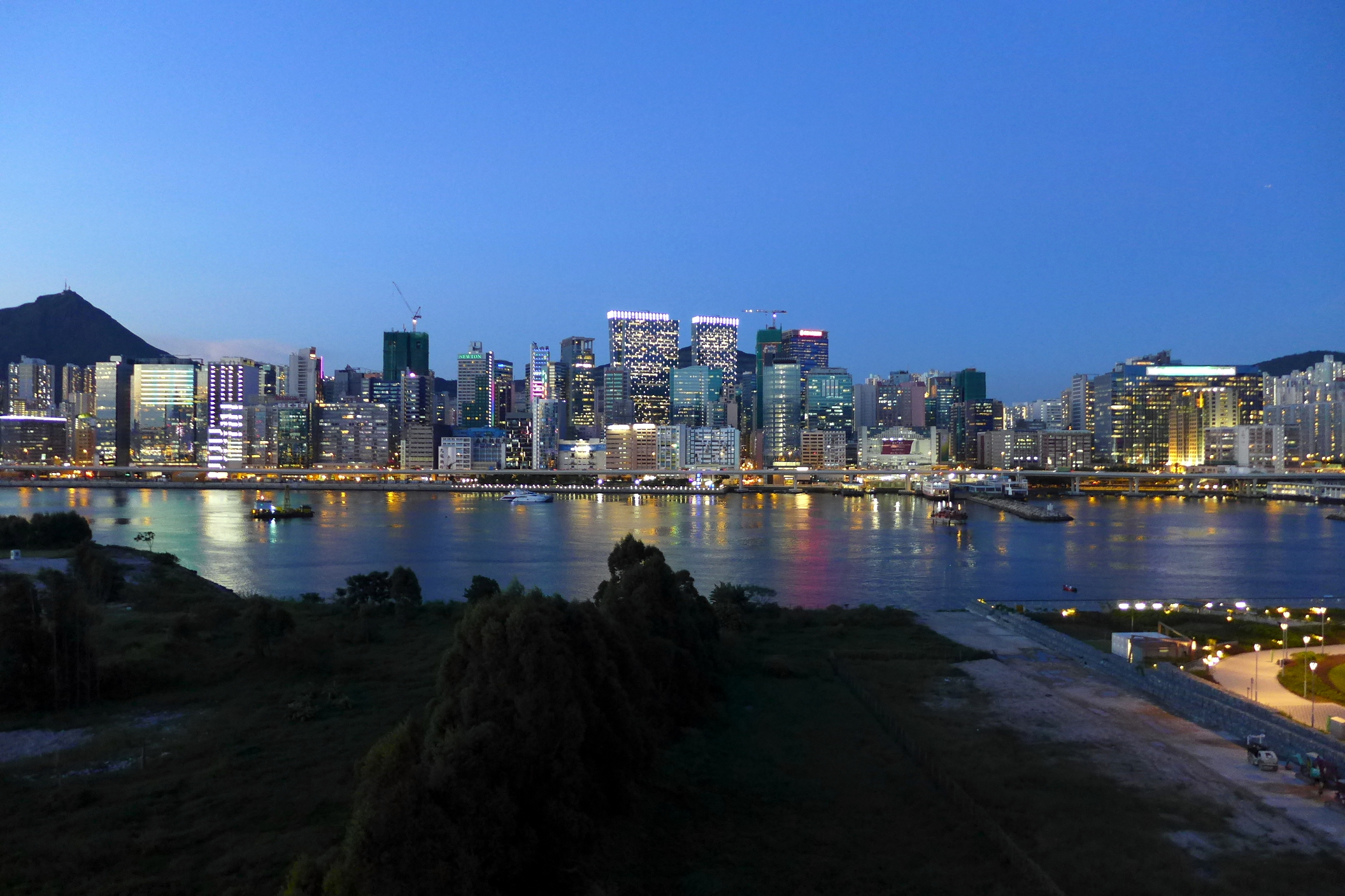 Kwun Tong Dusk View